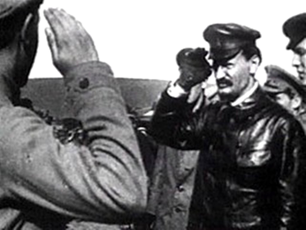 Троцкий в "кожанке" (1918-1920)